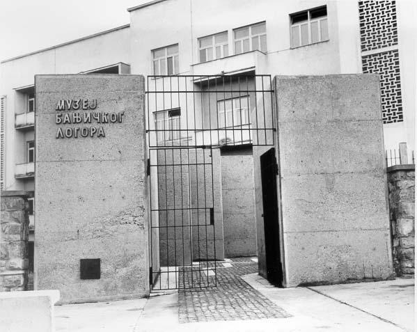 Srpskohrvatski / српскохрватски: Muzej banjičkog logora